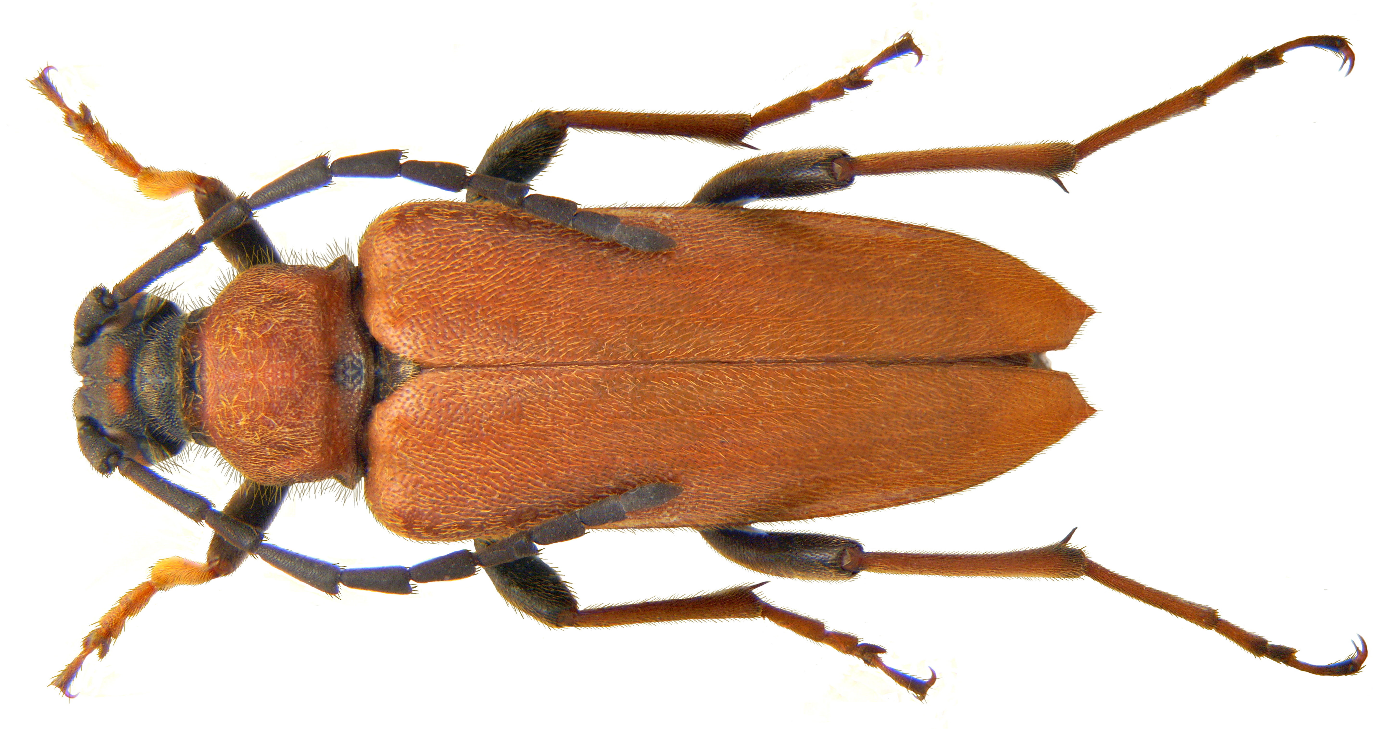 Familie: Cerambycidae Groesse: 10-20 mm Verbreitung: Europa Ökologie: Entwicklung in Nadelbäumen Fundort: Italien, Südtirol, Varna leg.det. U.Schmidt, 1972 Photo: U.Schmidt, 2009